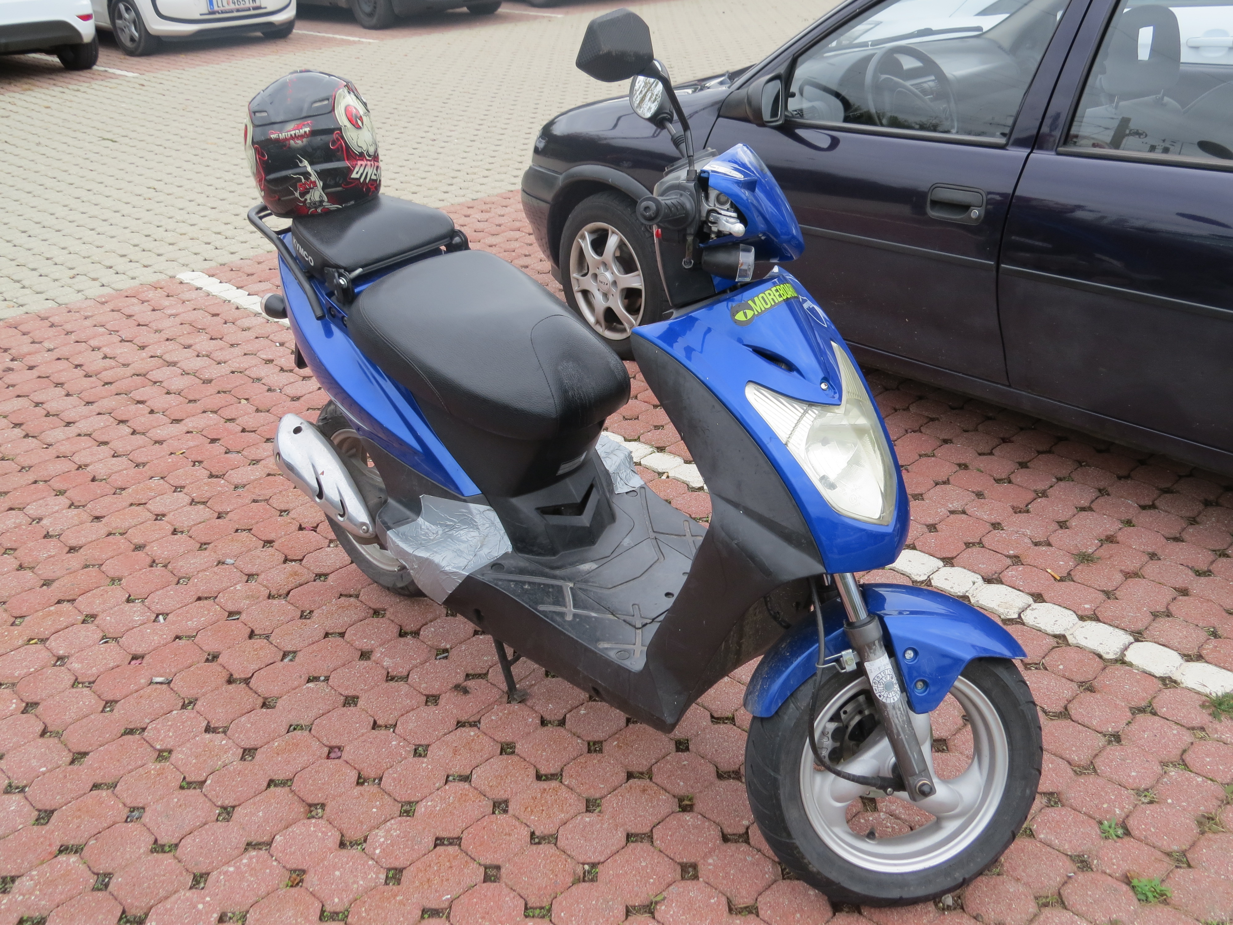 Kymco scooter at Bahnhof Enns